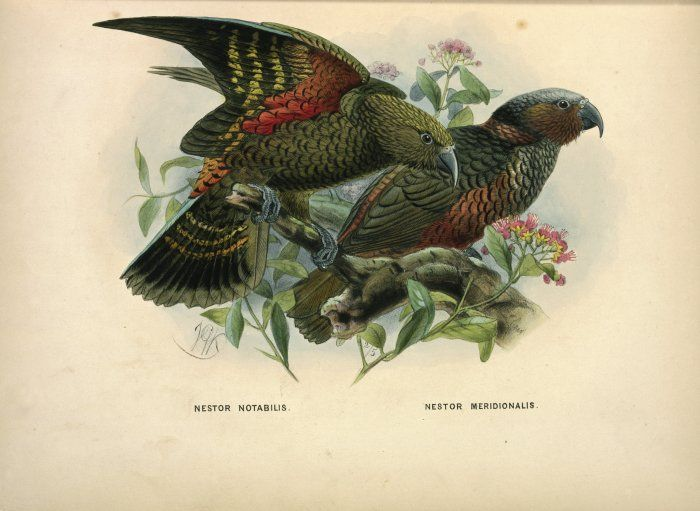 Kea, "Nestor notabilis", Kaka "Nestor meridionalis"